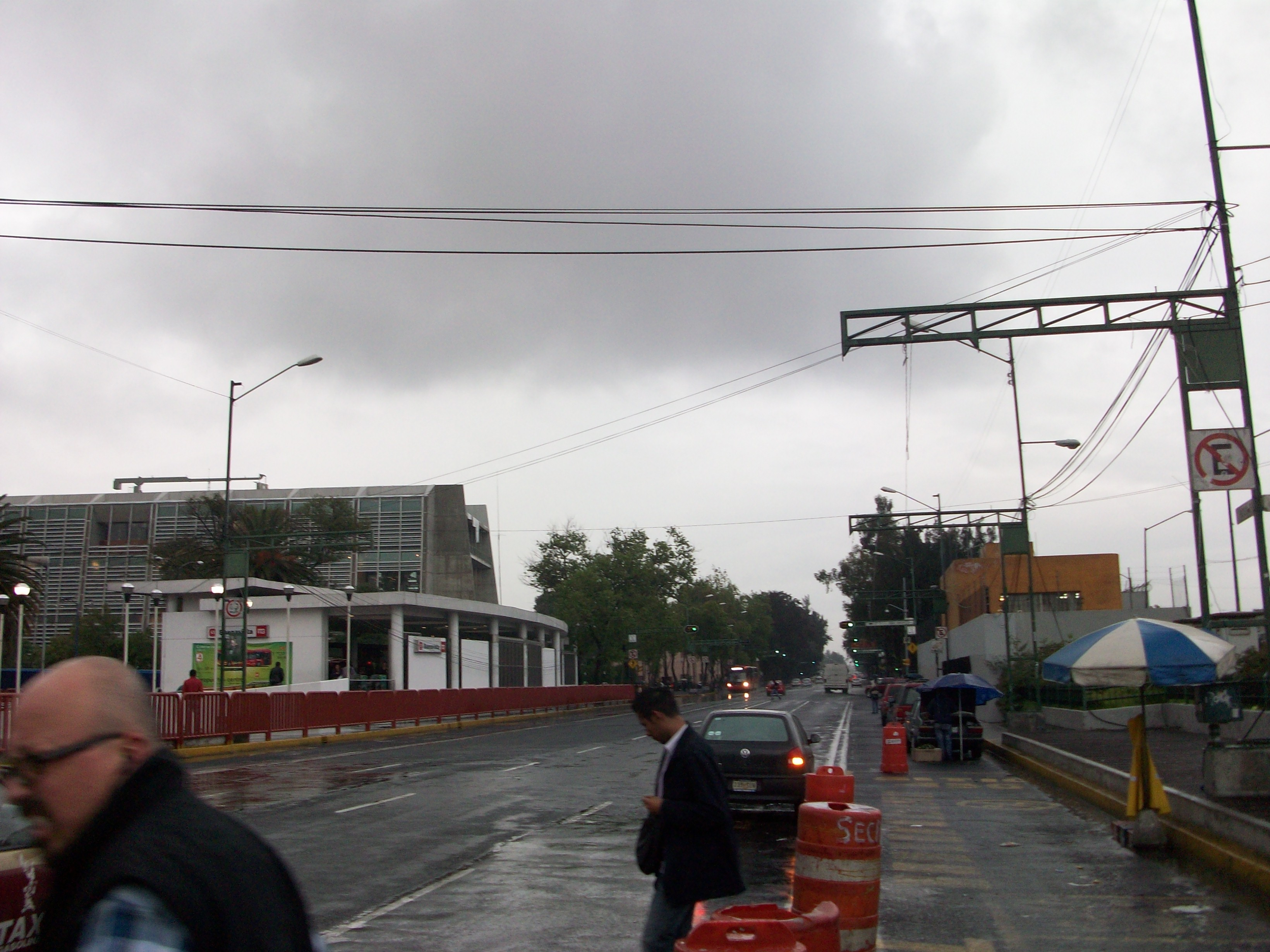 Avenida Mosqueta